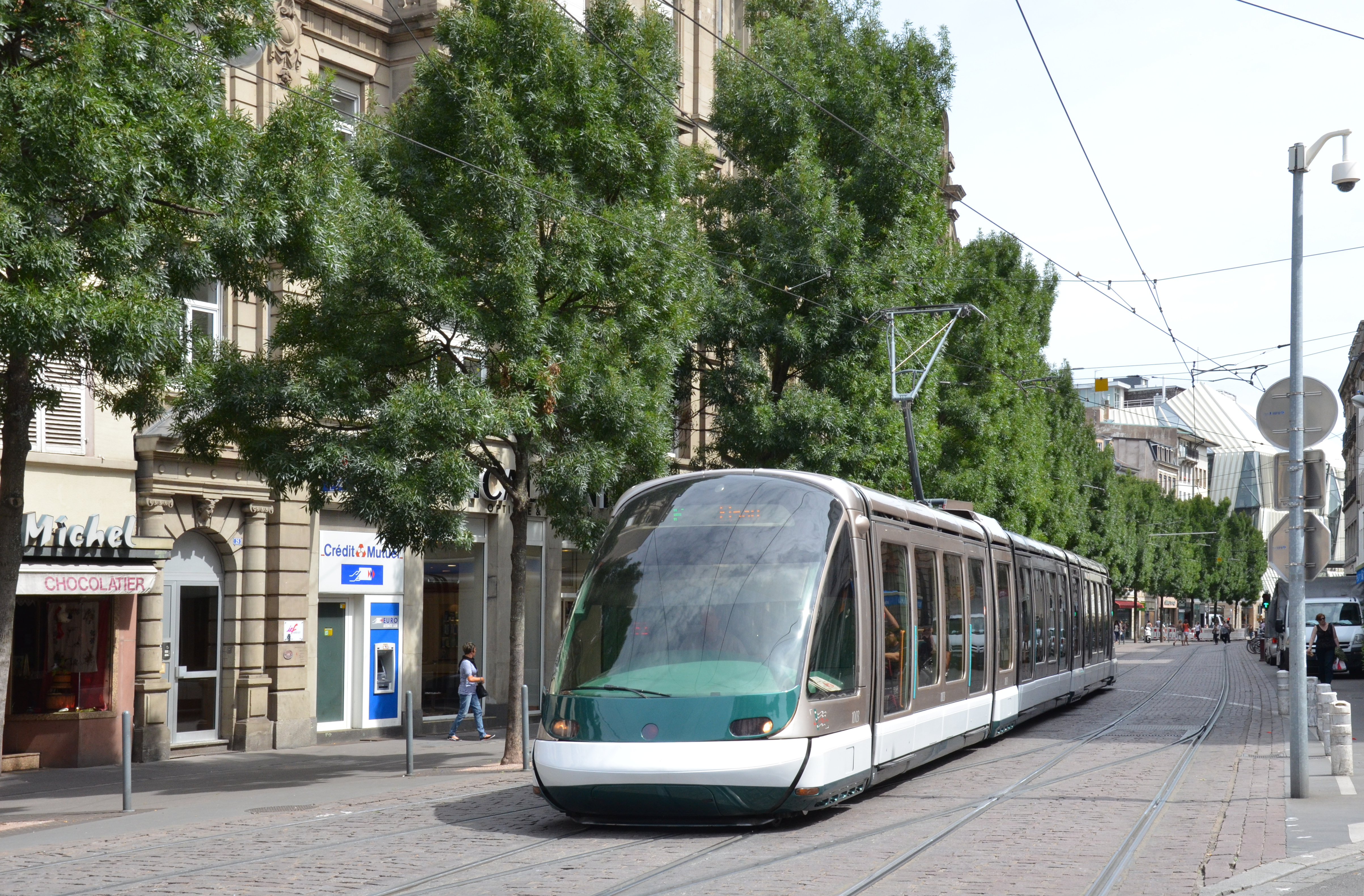 Bombardier Eurotram n°1003 sur la ligne F du réseau CTS de Strasbourg, près de la station Alt Winmärik.